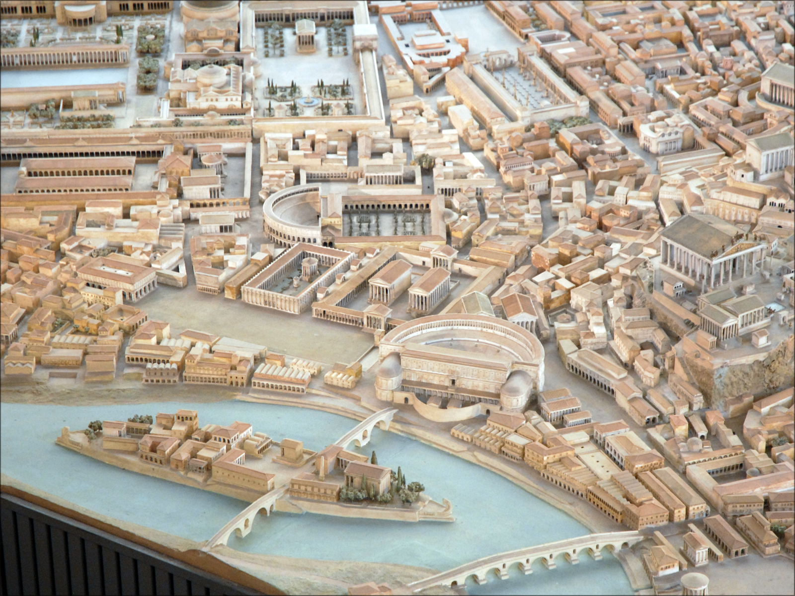 Maquette de Rome à l'époque de Constantin (306-337) réalisée par Italo Gismondi entre 1933 et 1937. Cette maquette de 200 m de long est présentée au musée de la civilisation romaine à l'EUR à Rome. Elle est à l'échelle 1/250. ______ Le Musée de la Civilisation Romaine, inauguré en 1955, illustre, dans ses 59 sections, tous les aspects de l'ancienne civilisation romaine à travers une vaste collection de moulages d'après les originaux, conservés dans tous les Musées du monde, mais qui sont aujourd'hui détruits ou endommagés, et à travers des maquettes reproduisant les monuments éparpillés sur toute la superficie de l'Empire romain. Le premier noyau des collections remonte à l'exposition archéologique organisée en 1911 dans le cadre des manifestations pour le cinquantenaire de l'unification d'Italie. Les 14 premières sections représentent une synthèse historique de Rome, des origines au VI siècle. Le restant des 45 sections est dédié aux aspects de la vie publique, religieuse, économique, militaire ainsi que privée. Les deux points forts du musée sont : - la grande maquette qui reproduit la ville de Rome à l'époque de l'Empereur Constantin, - les moulages de la Colonne Trajane